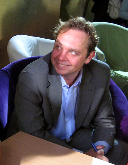 Jakub Strzyczkowski na dniu Otwartym TVP